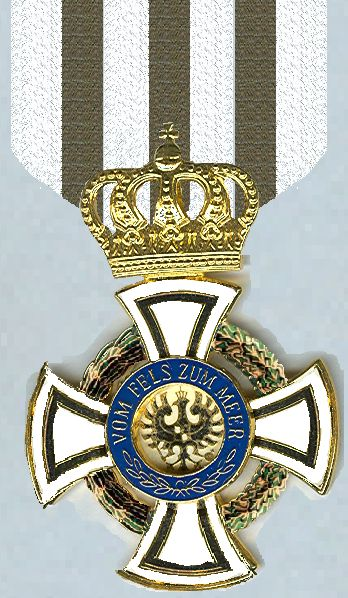 Scan. Particuliere verzameling Groningen.(mijn eigen verzameling) Robert Prummel 2007